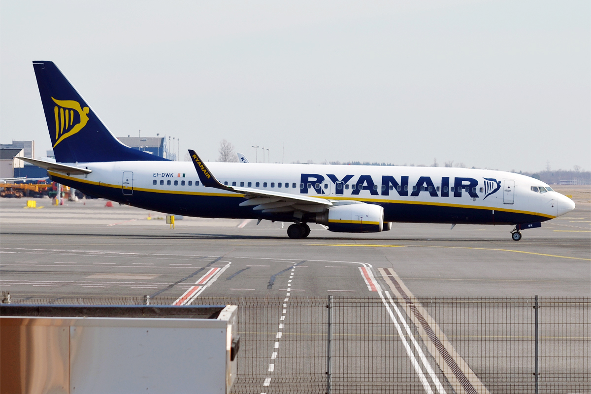 Ryanair, EI-DWK, Boeing 737-8AS